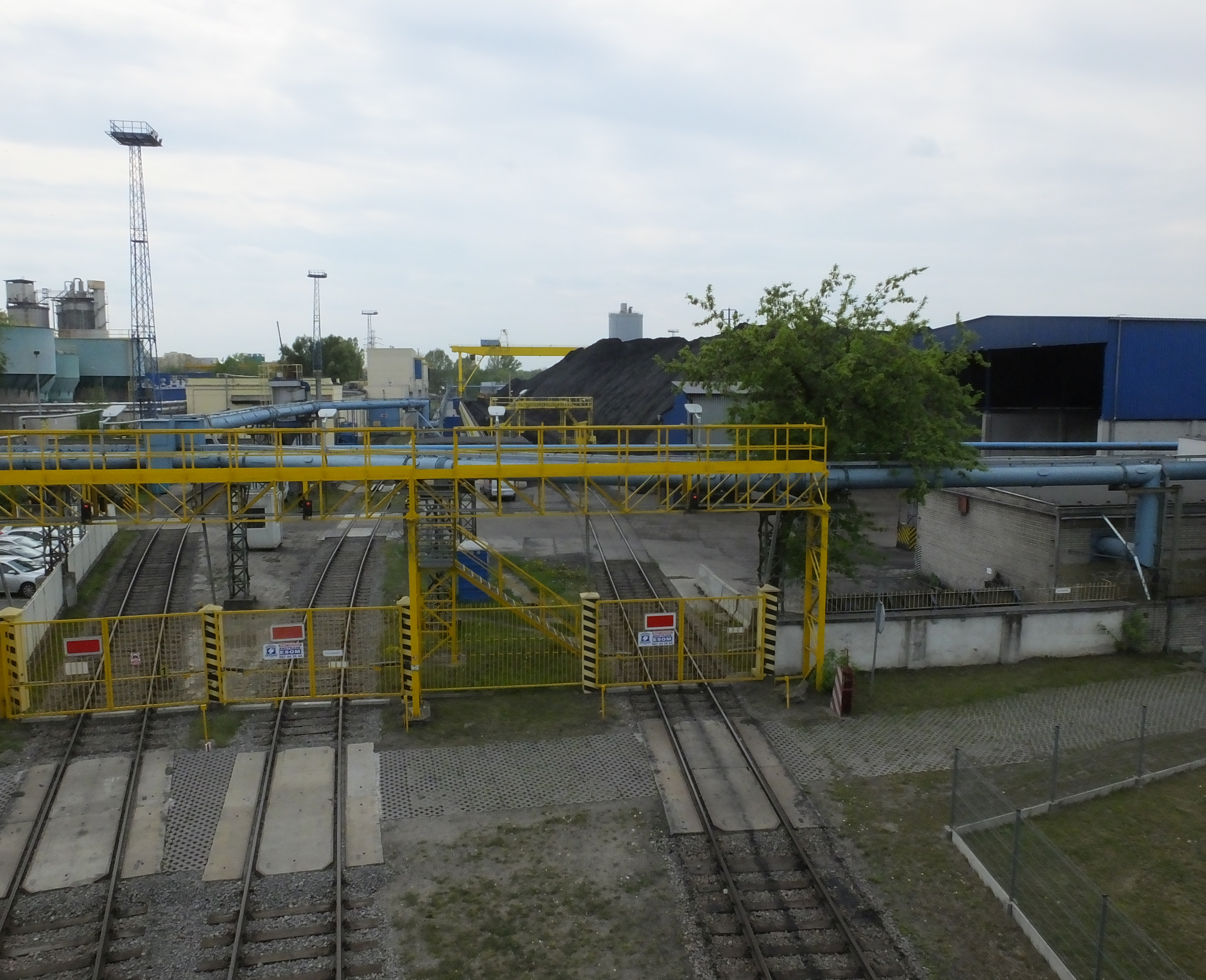 Elektrociepłownia Żerań. Linia kolejowa i skład węgla nad Kanałem Żerańskim.